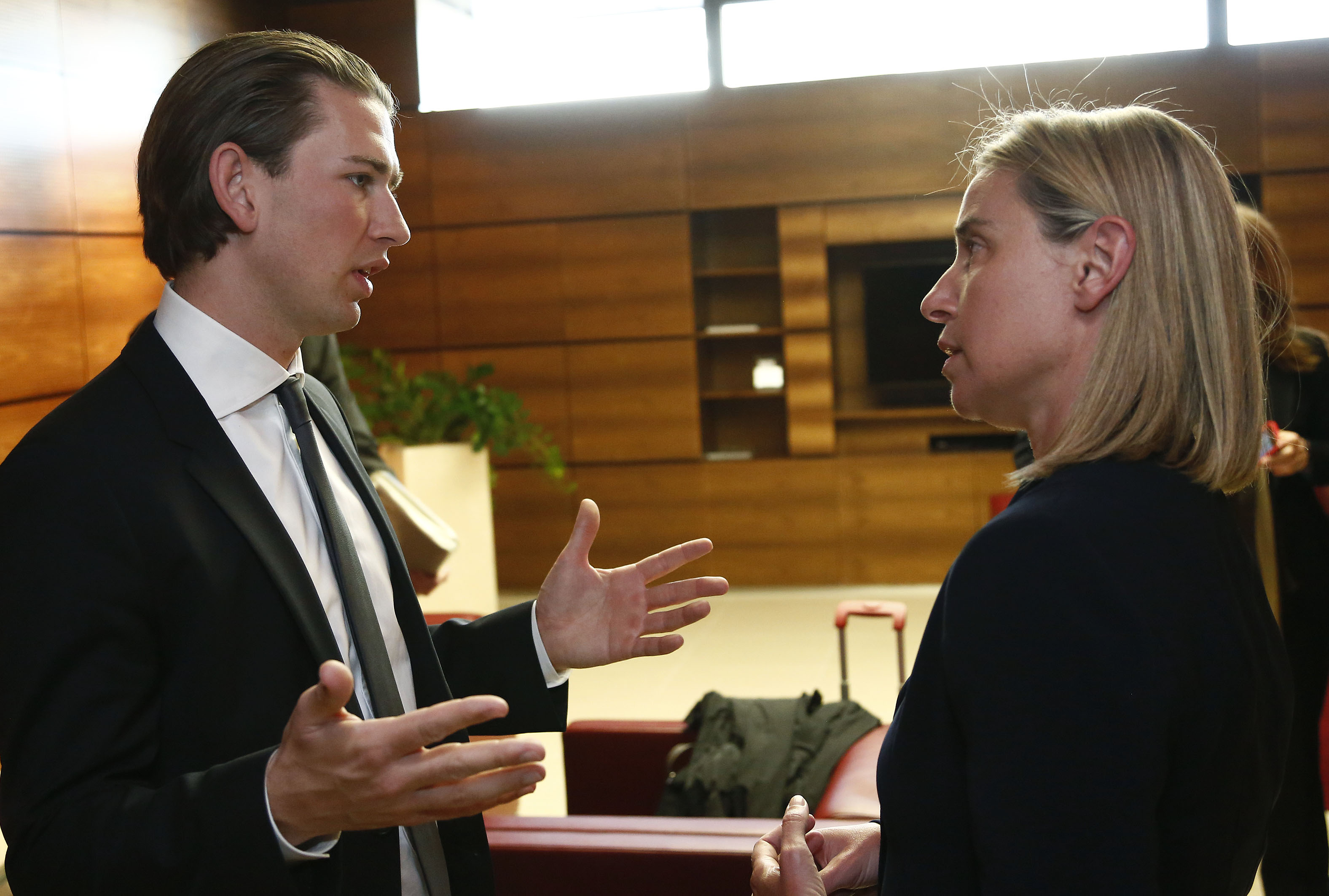 Ministerkomitee des Europarates. Außenminister Sebastian Kurz trifft die italienische Außenministerin Federica Mogherini. 05.05.2014, Foto: Dragan Tatic